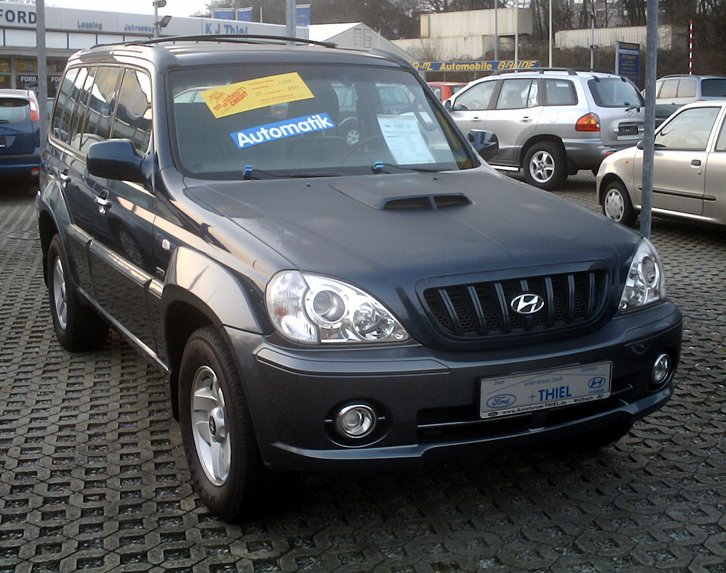 Hyundai Terracan